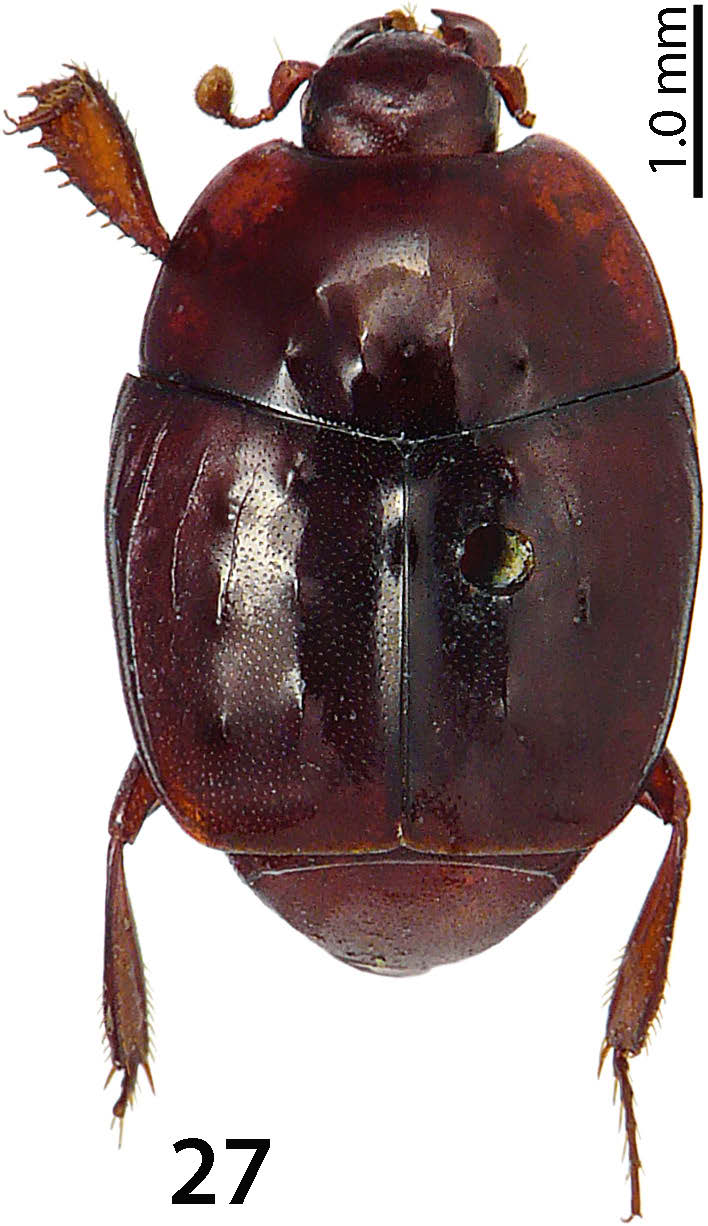 Phoxonotus lectus, male, holotype.